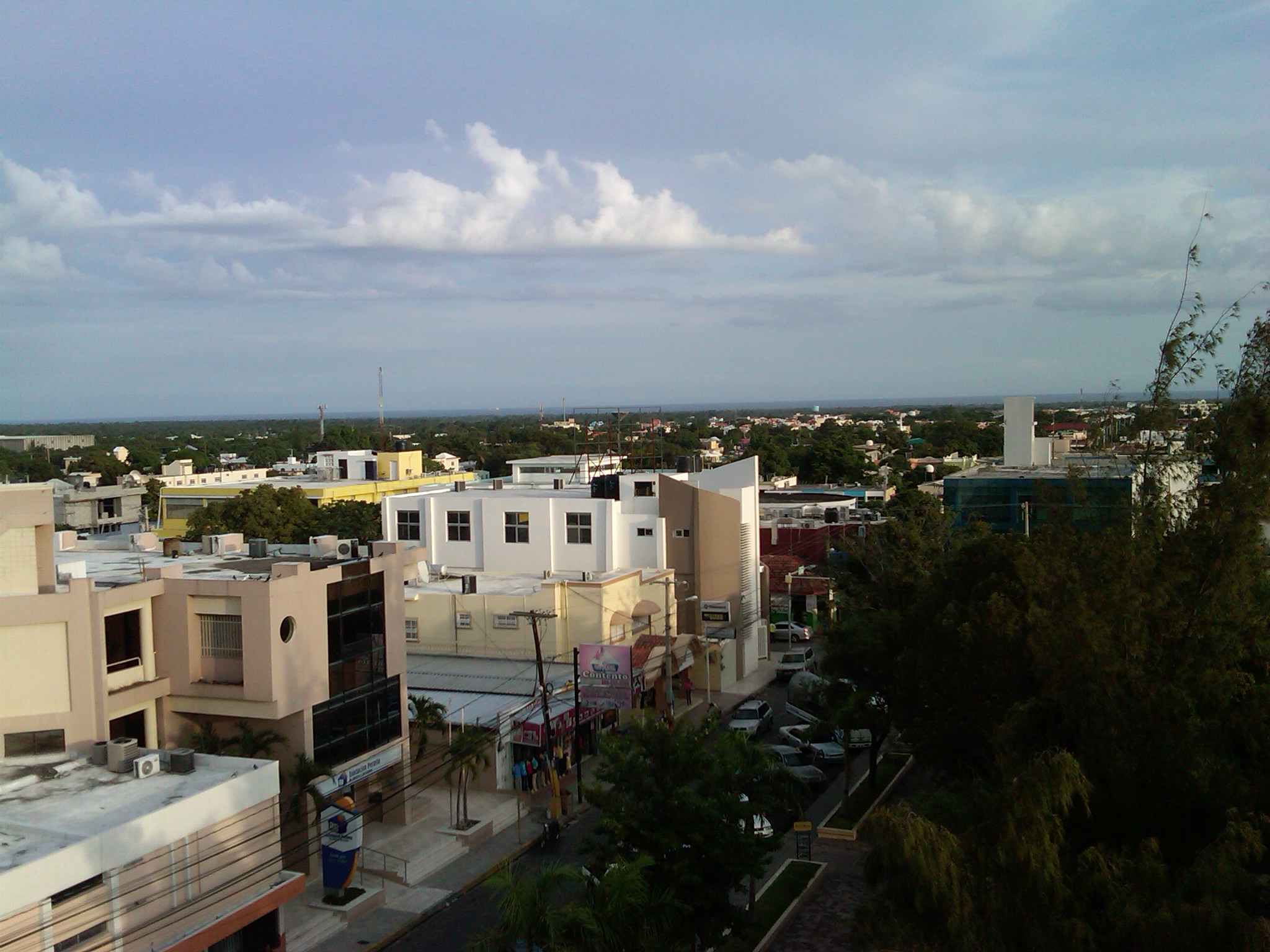 Zona Central de Baní